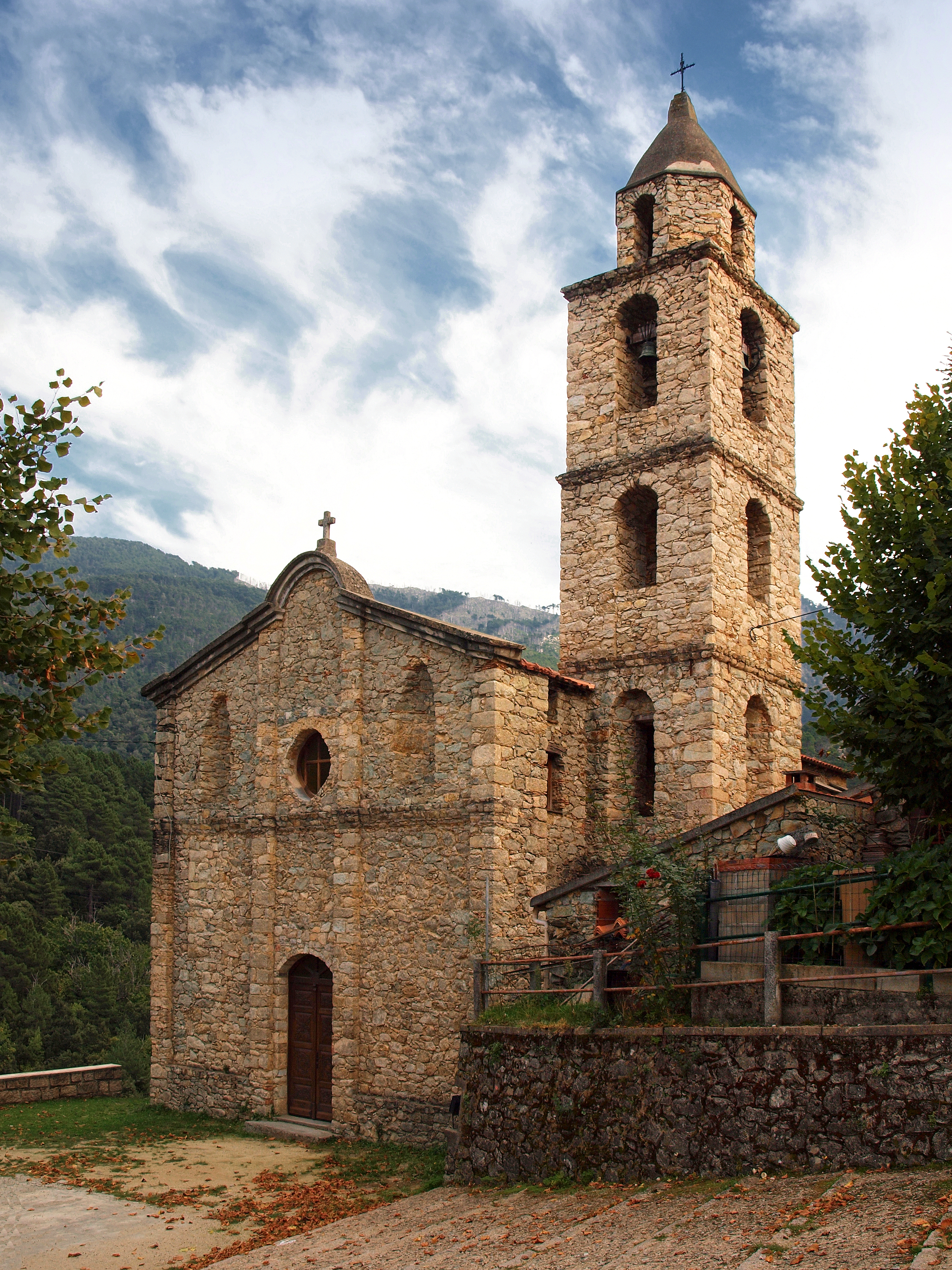 Muracciole, Centre Corse (Corse) - Église de l'Assomption